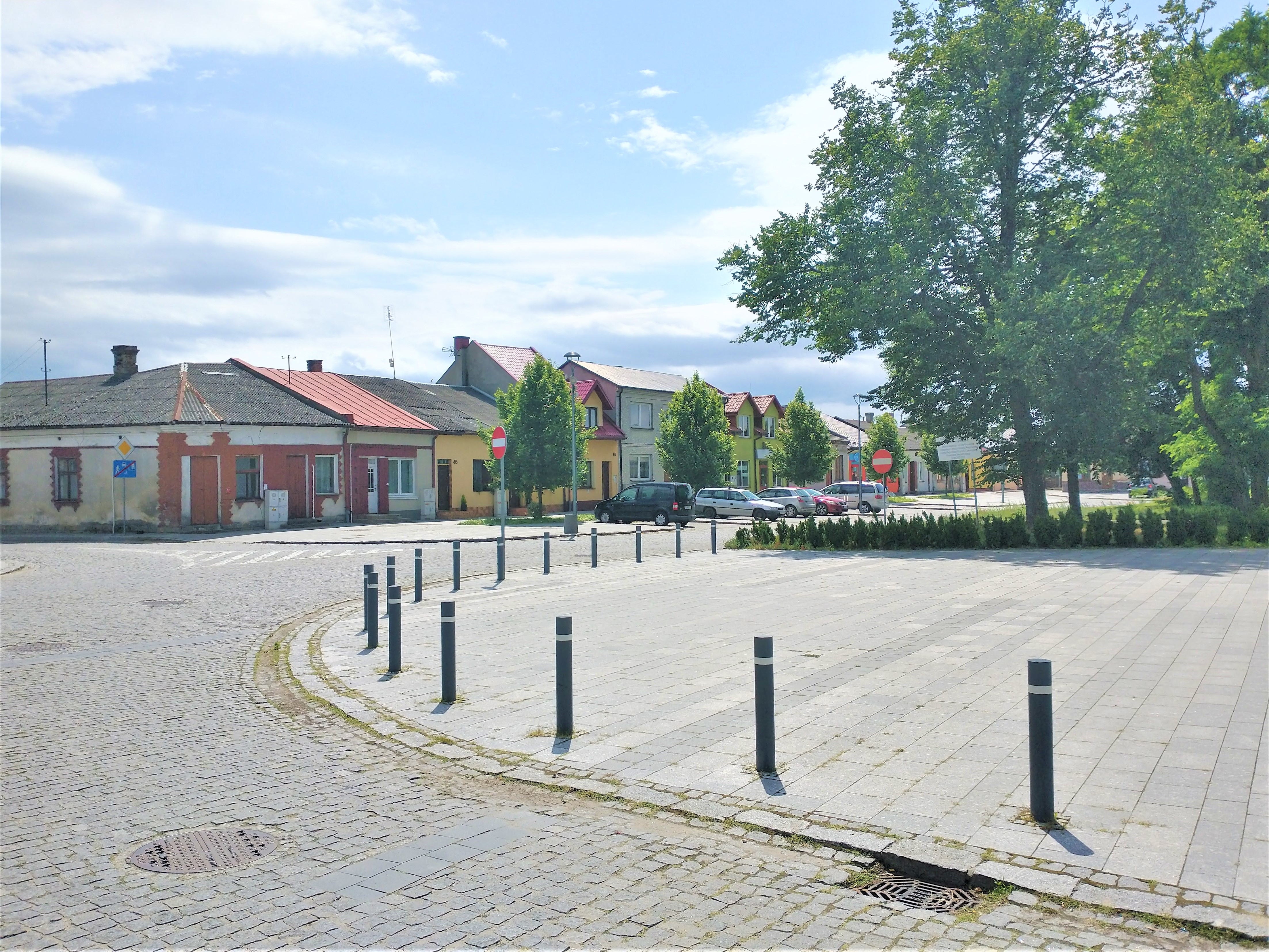 Rynek w Rakowie (świętokrzyskie).